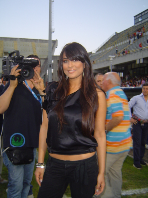 Maria Mazza